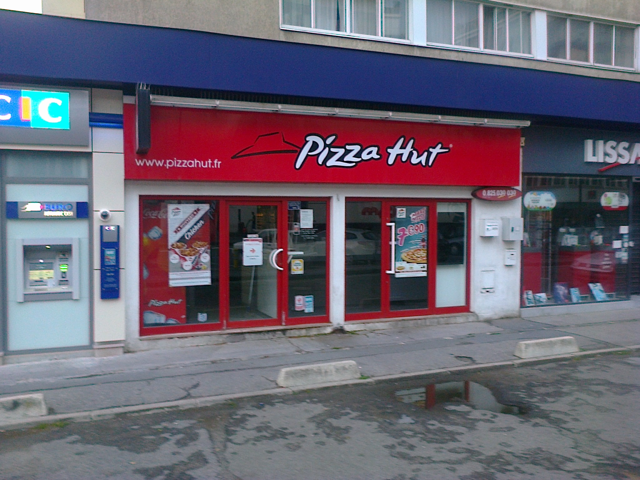 Pizza Hut de Sèvres